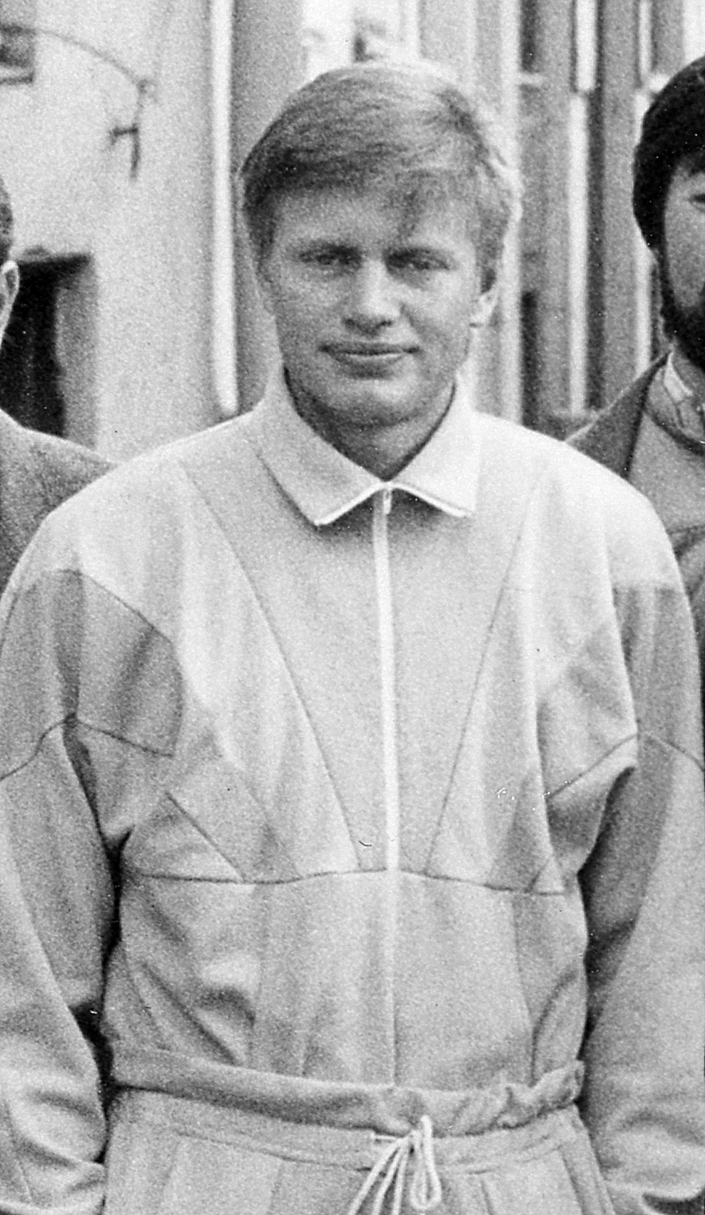 Igor Lematško